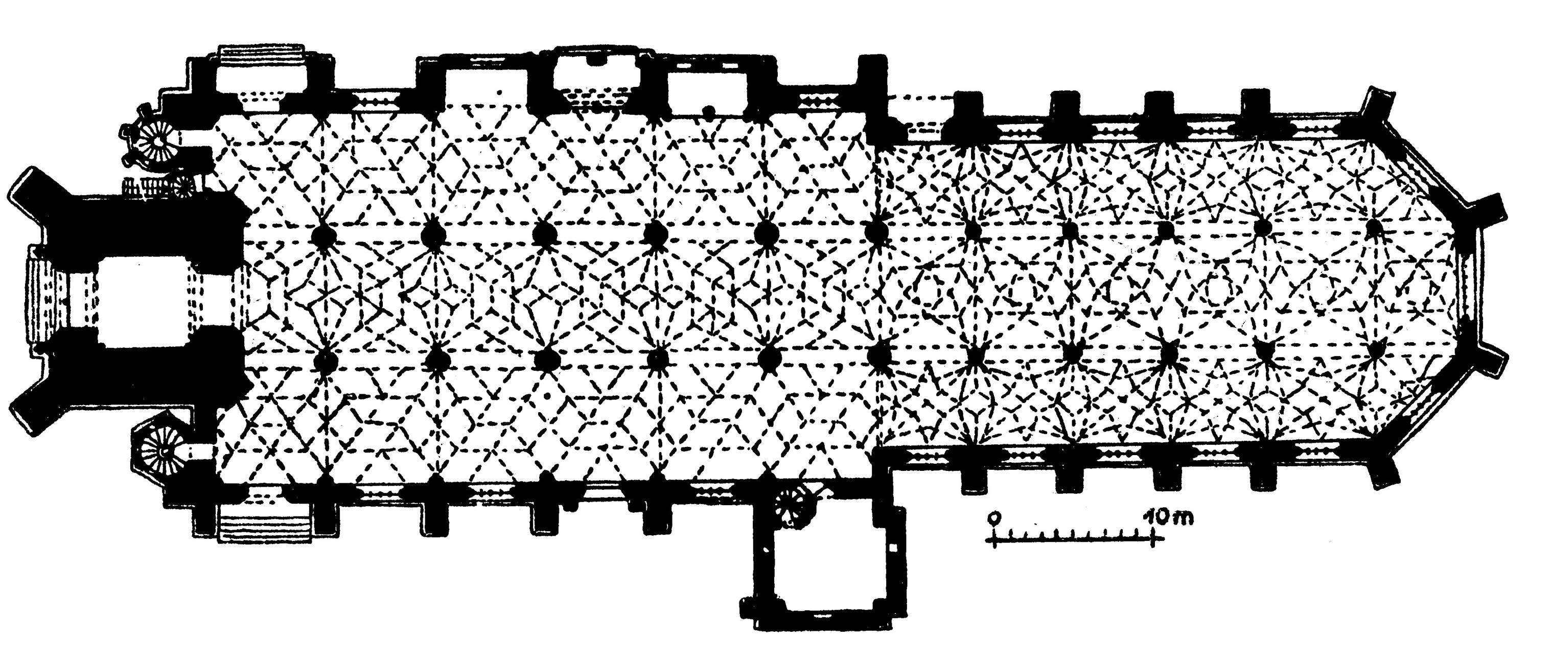 Grundriss der Kirche St. Georg in Nördlingen